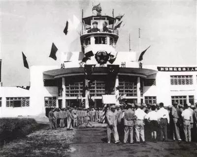 中文（香港）: 中華人民共和國民航局广州办事处在白云机场舉行開航儀式